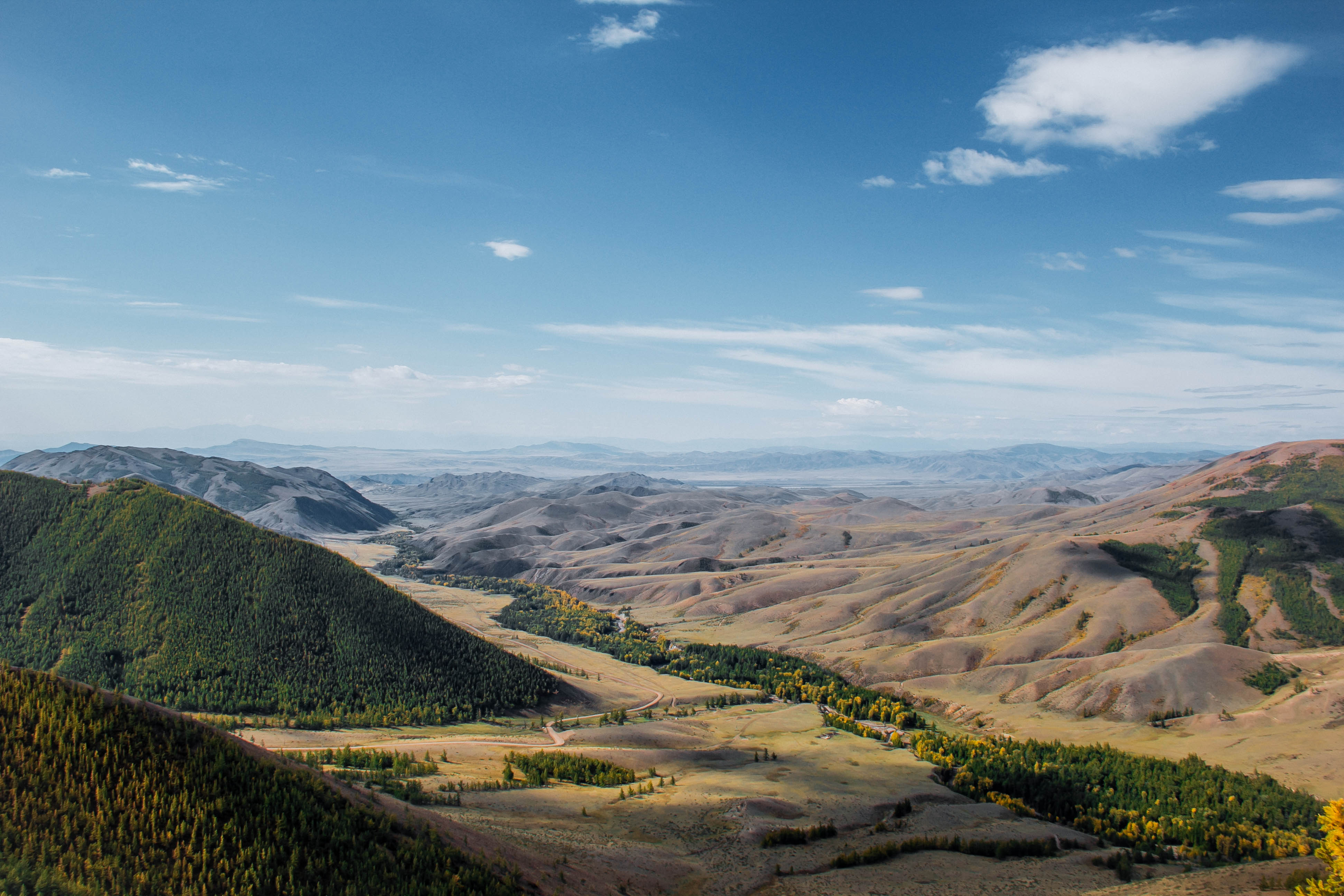 Овюрский район РТ. Перевал.